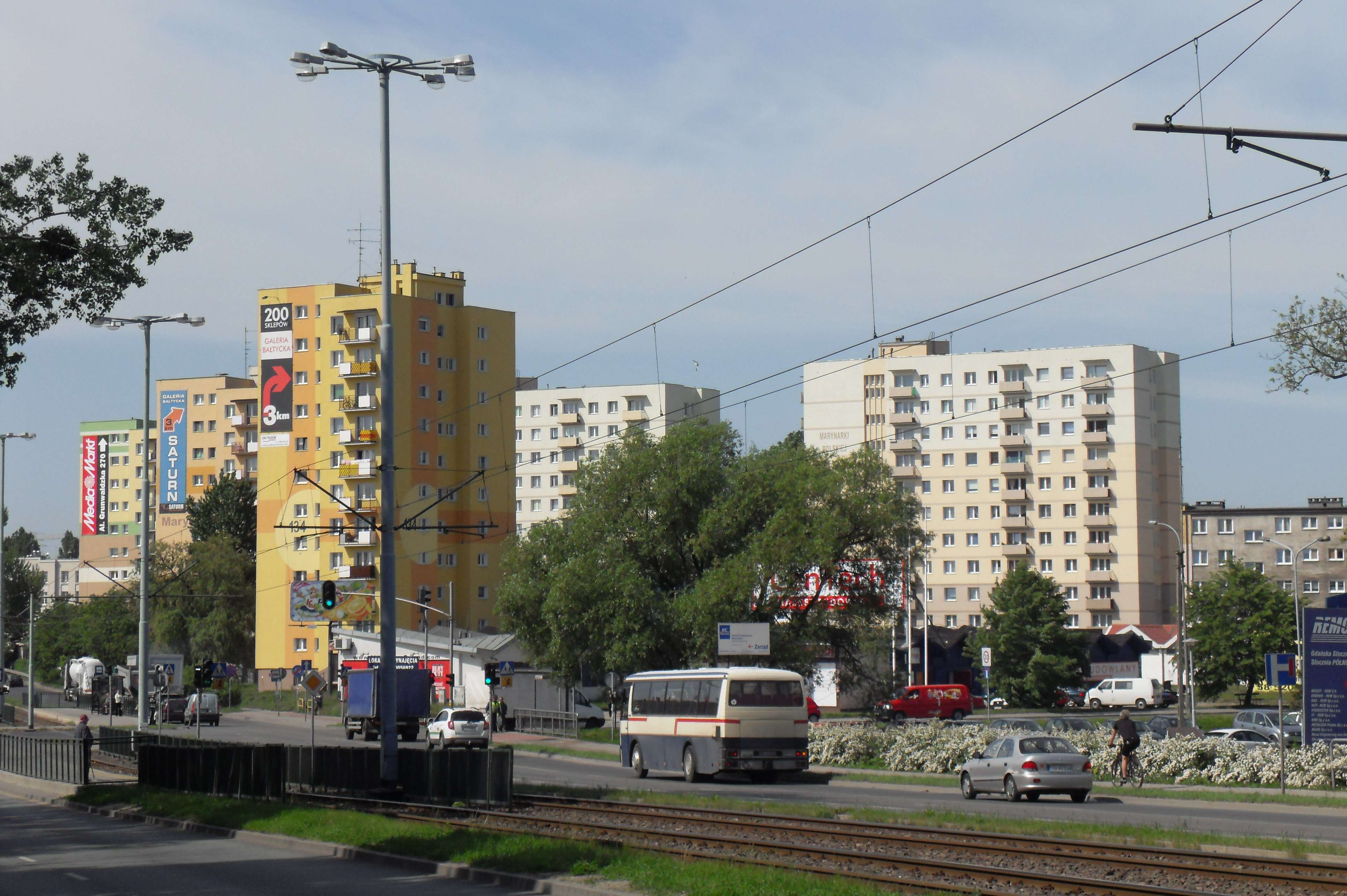 Gdańsk Młyniska, osiedle Zielony Trójkąt, wieżowce przy ul. Marynarki Polskiej.